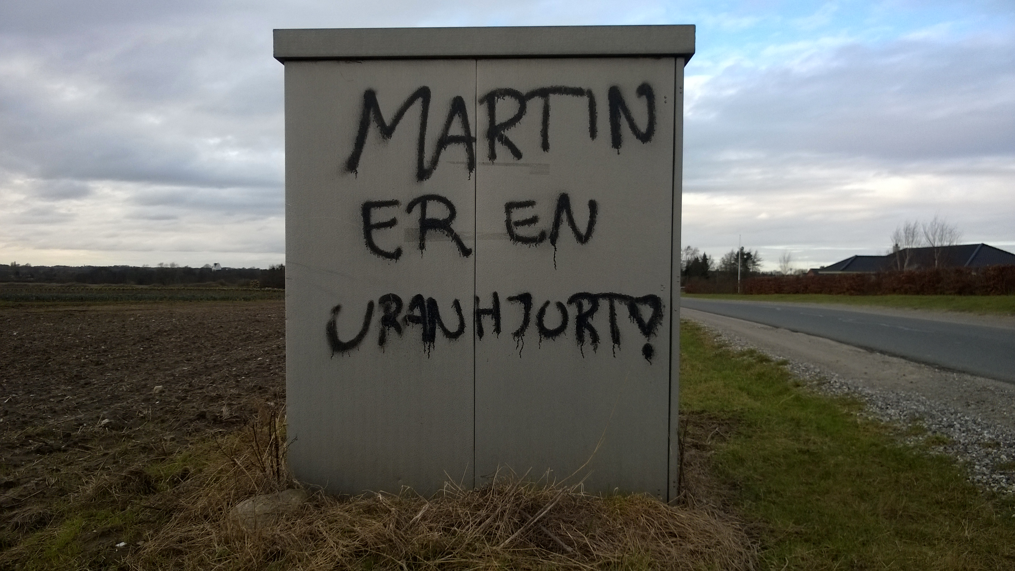 En graffito med teksten "Martin er en uranhjort" (en henvisning til sangen "Uranhjort" af Roben & Knud; billedet er taget på Gl. Vindingevej i Nyborg.